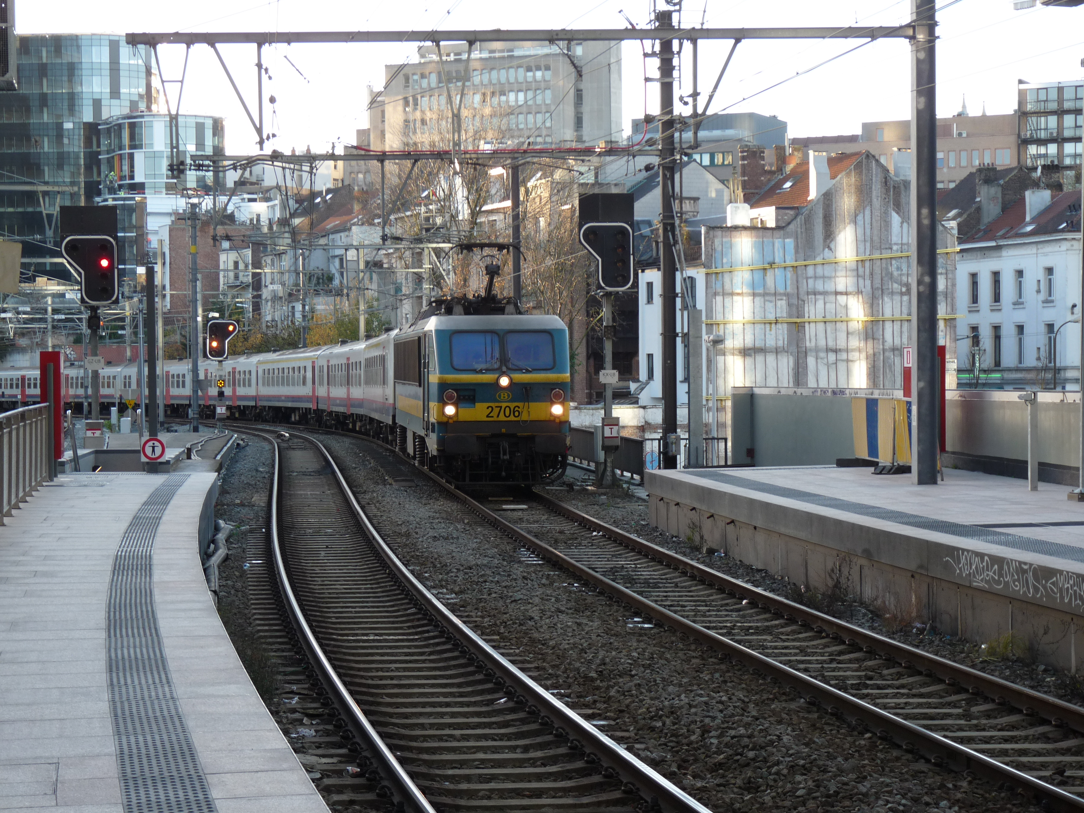 Getrokken trein bij Schuman